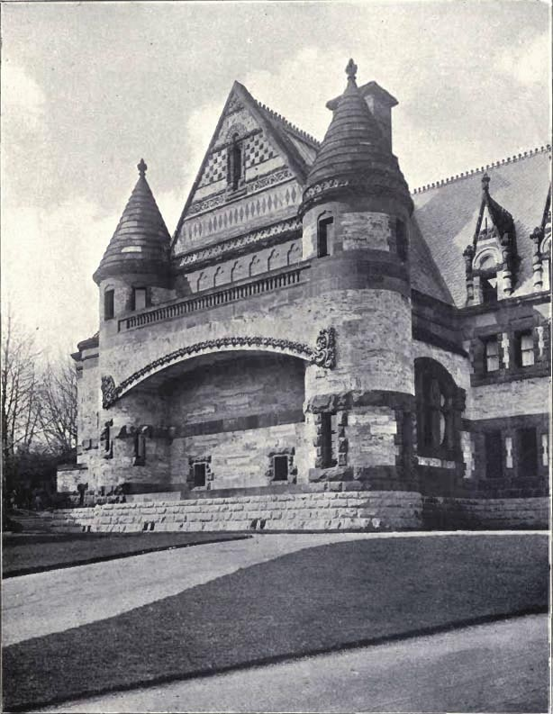 Lululaund mansion.